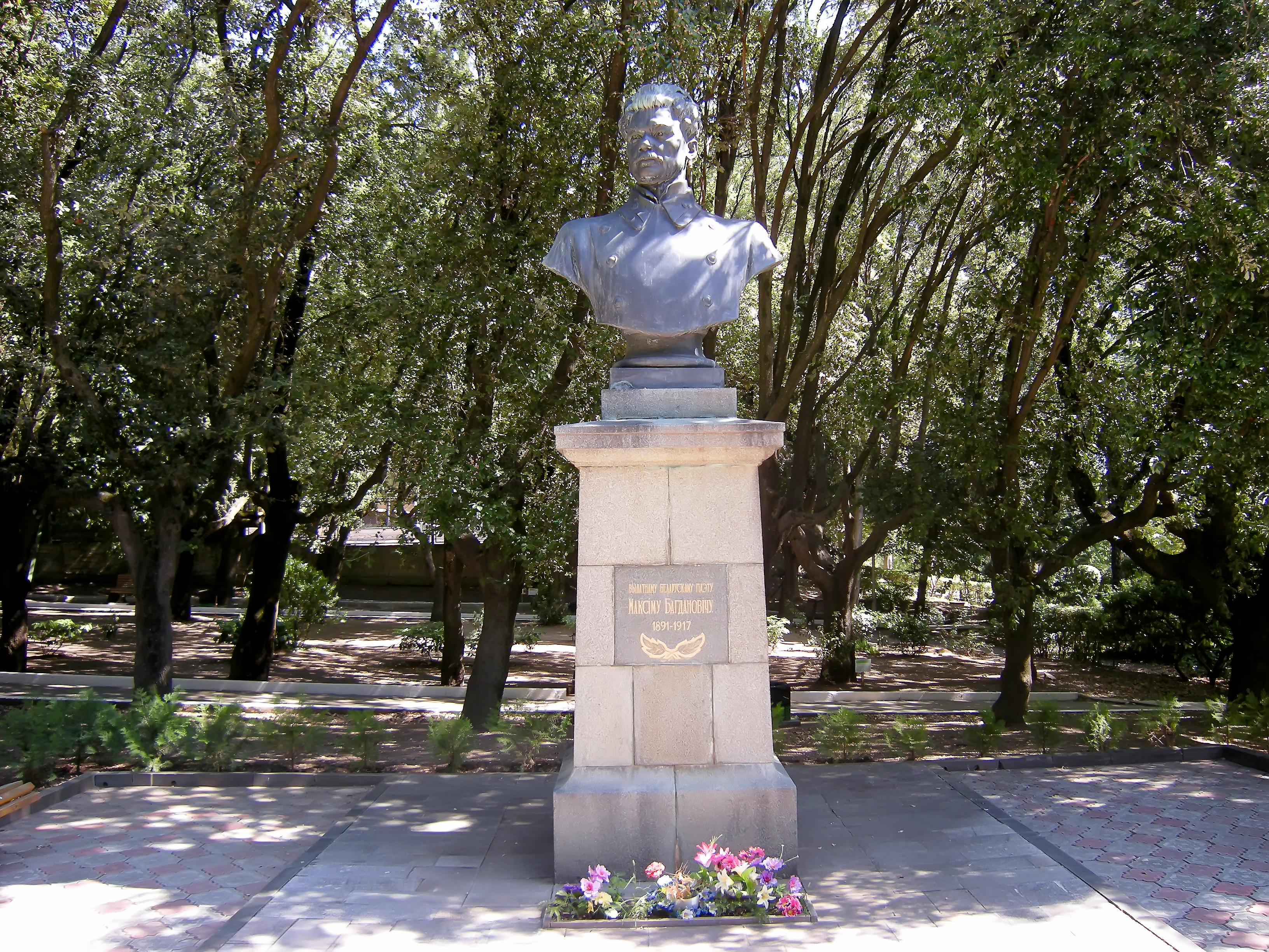 Классик белорусской литературы – поэт Максим Богданович. В Крым Максим Богданович впервые приехал восемнадцатилетним юношей весной 1909-го года из-за болезни, которая мучила всю семью Богдановичей – туберкулёза. Во второй раз поэт приехал в Крым в 1915-м году уже широко известным. Третий приезд Максима Богдановича в Крым в начале 1917 года стал последним. Поэт поселился в Ялте. В Ялте написаны его последние строки: «В краю светлом, где я умираю…» Памятник белорусскому поэту М.А.Богдановичу. Дата сооружения: 1957 г.: улица Мисхорский спуск, 2, санаторий «Белоруссия», парк, Кореиз, Ялта, Крым The legal status of the Crimean region is currently disputed. This template makes no claims in this respect.